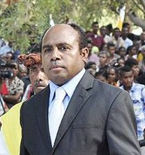 Tetun: Regio da Cruz Salu